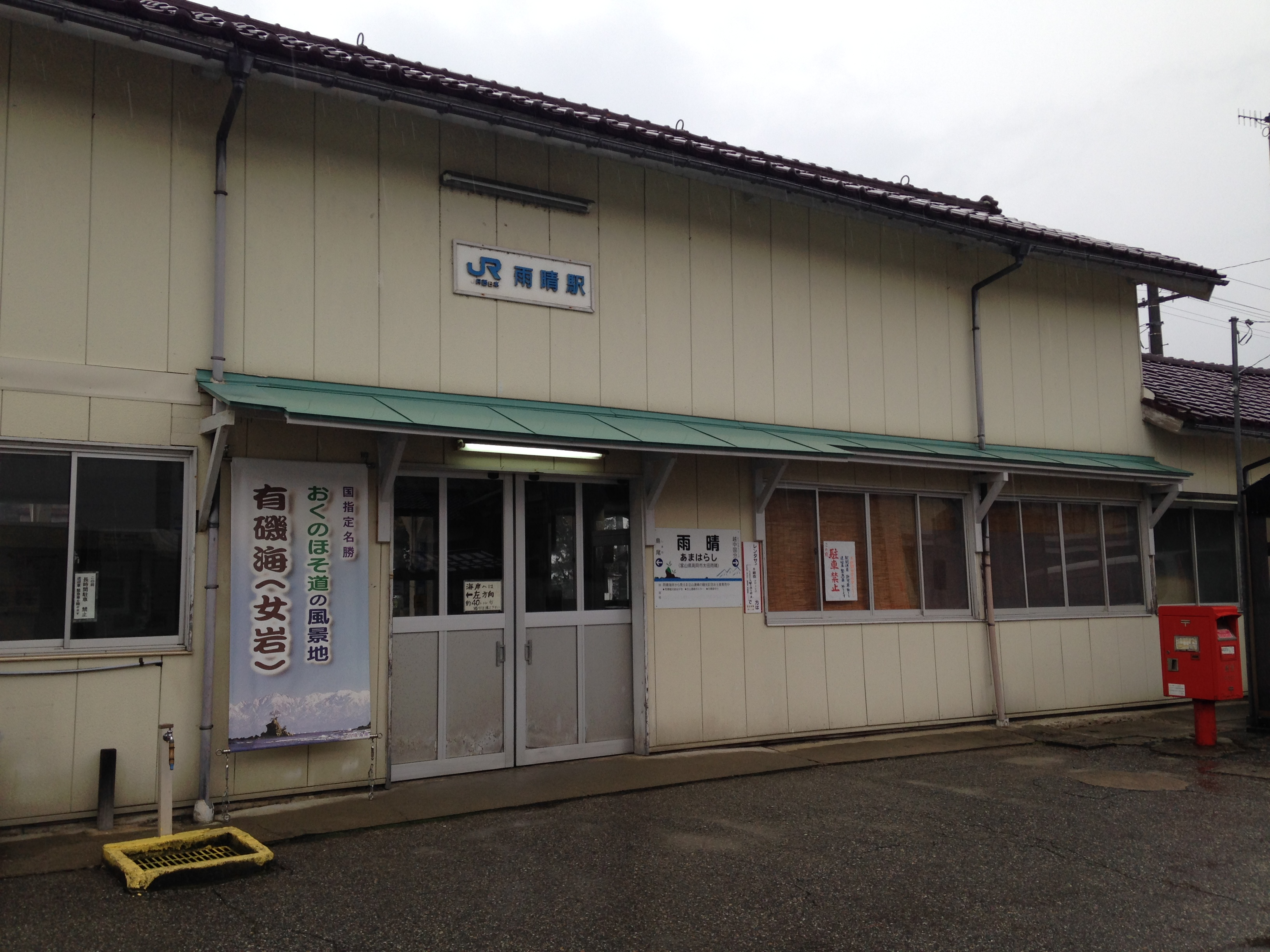 雨晴駅駅舎